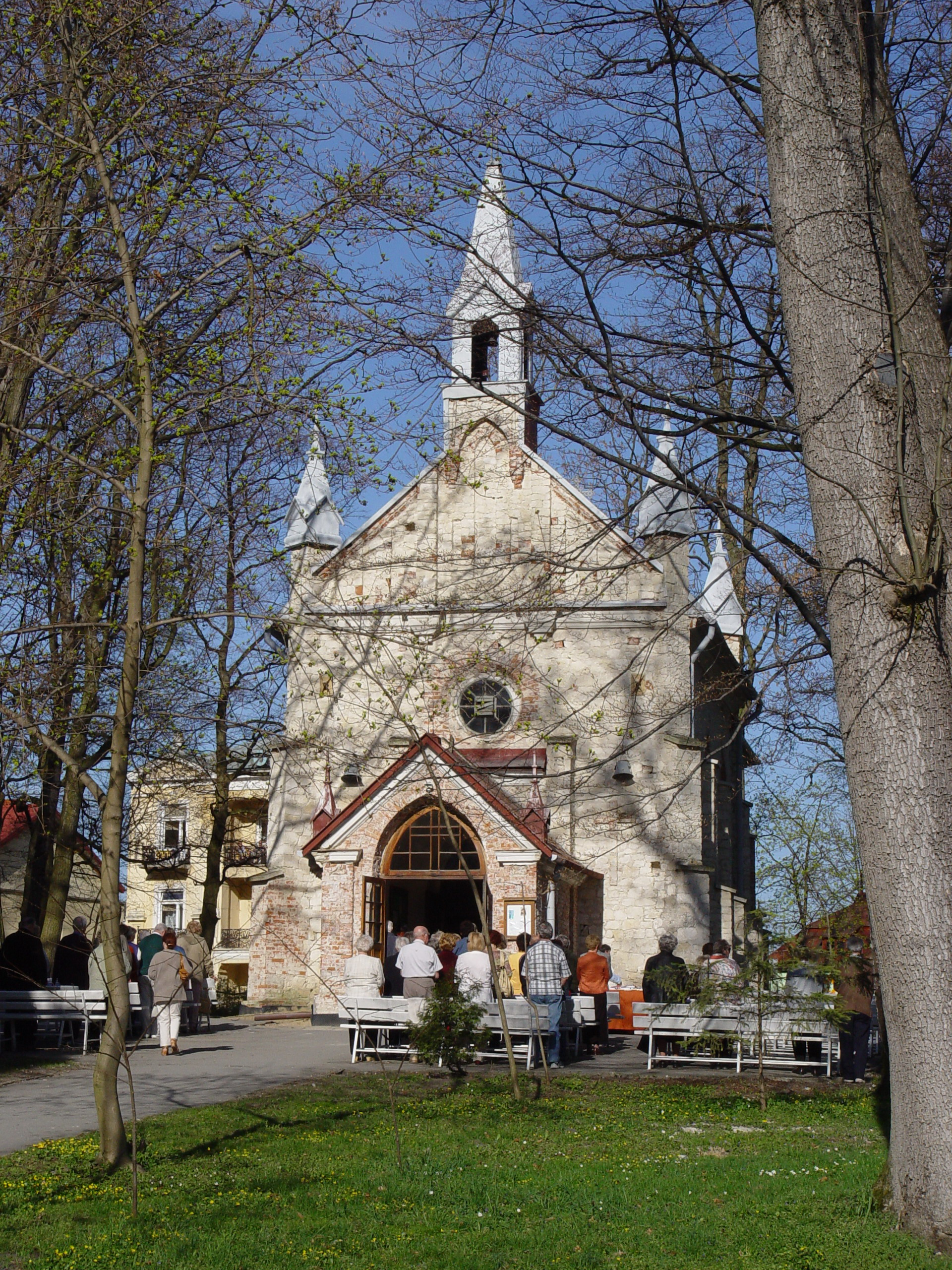 Busko-Zdrój, ul. 1 Maja - kaplica św. Anny w parku zdrojowym, obecnie kościół filialny (zdrojowy), 1884-1886, 1907